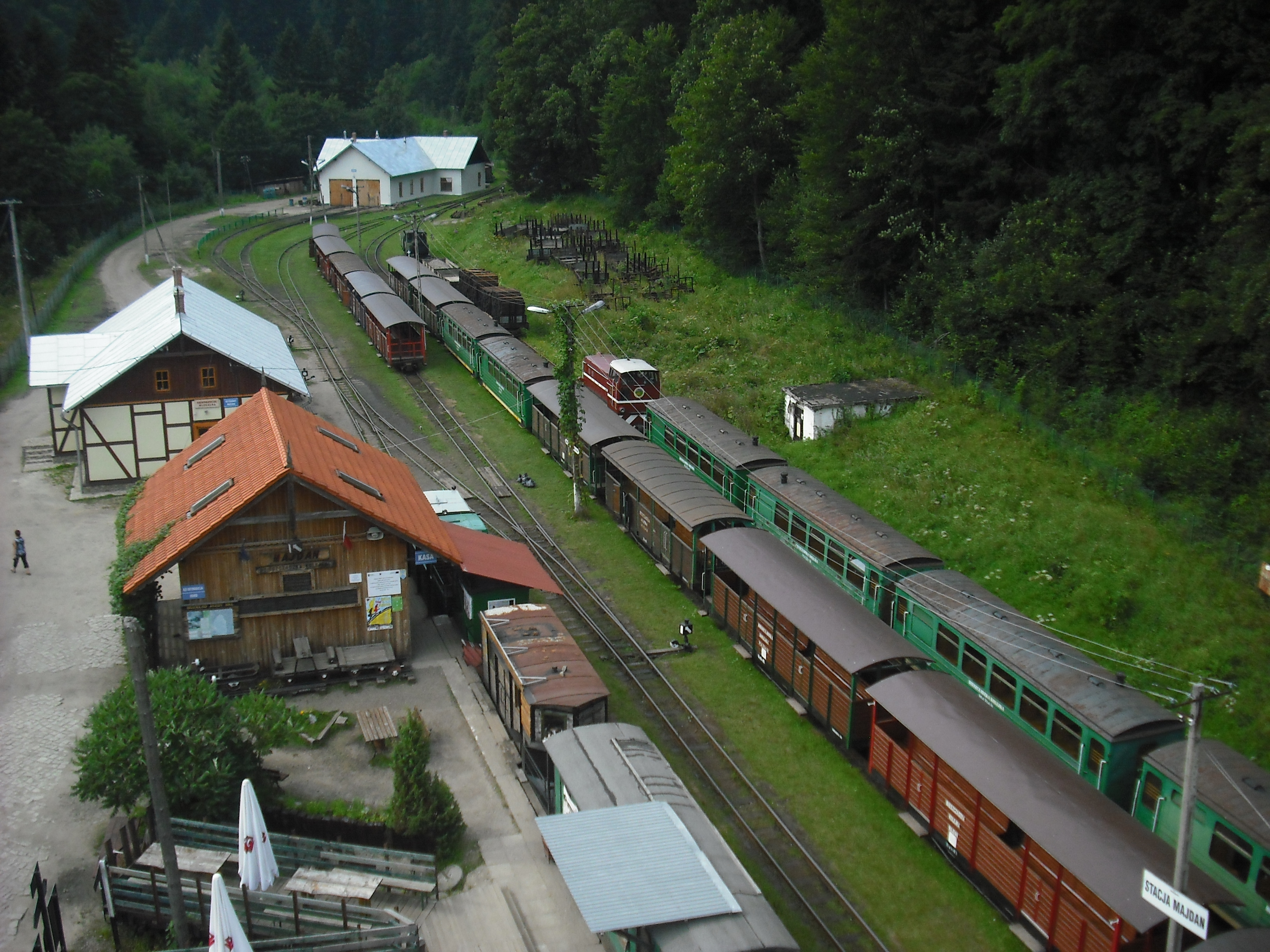 Zespół stacji kolejki bieszczadzkiej w Majdanie. Widok z lotu ptaka na centralną część stacji. Na dalszym planie widoczna parowozownia (zabytek nr A-284 z 28.11.1992)